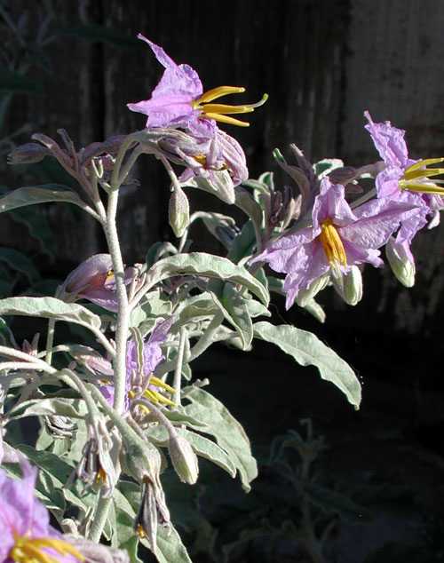 Solanum eleagnifolium in Phoenix, Arizona.